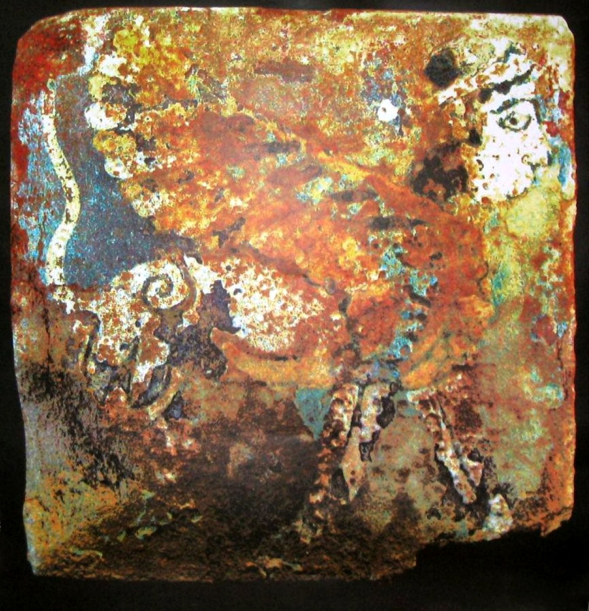 آجری لعاب دار از قلایچی بوکان